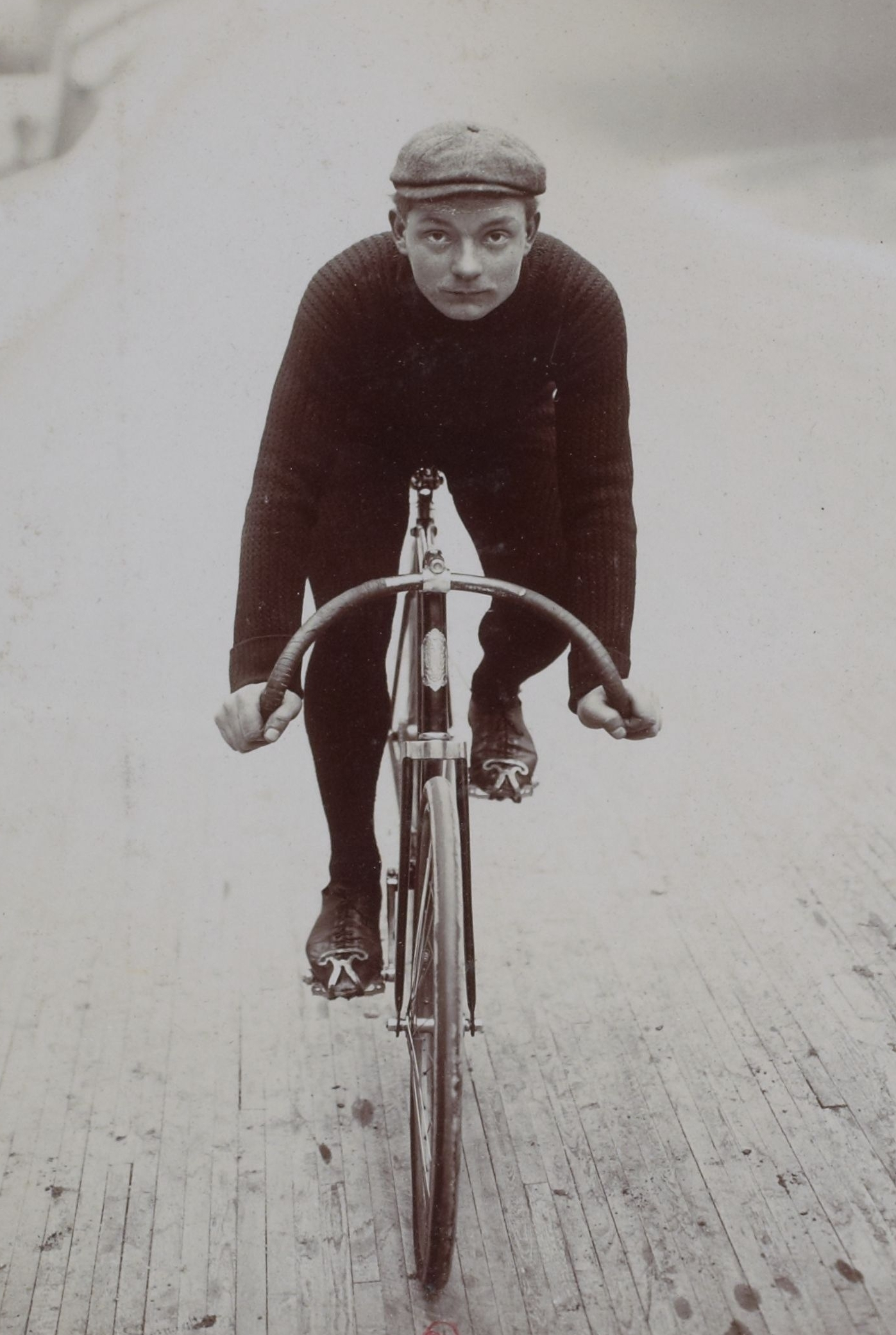 [Collection Jules Beau. Photographie sportive] : T. 31. Années 1905 et 1906 / Jules Beau : F. 27. Cornet